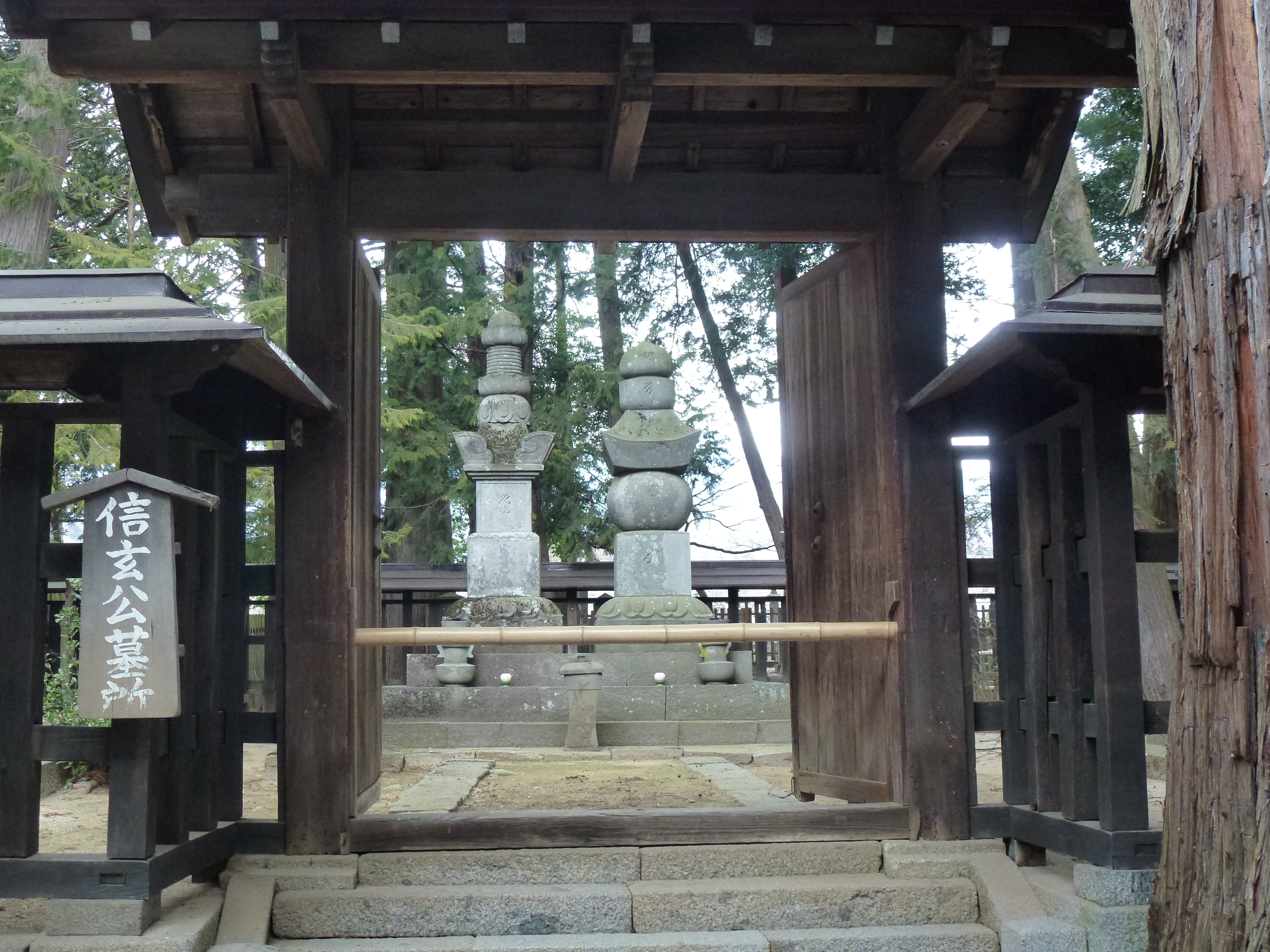 Eines der angeblichen Gräber Fürst Takeda Shingens, das pompöseste und vielleicht auch das Echte.